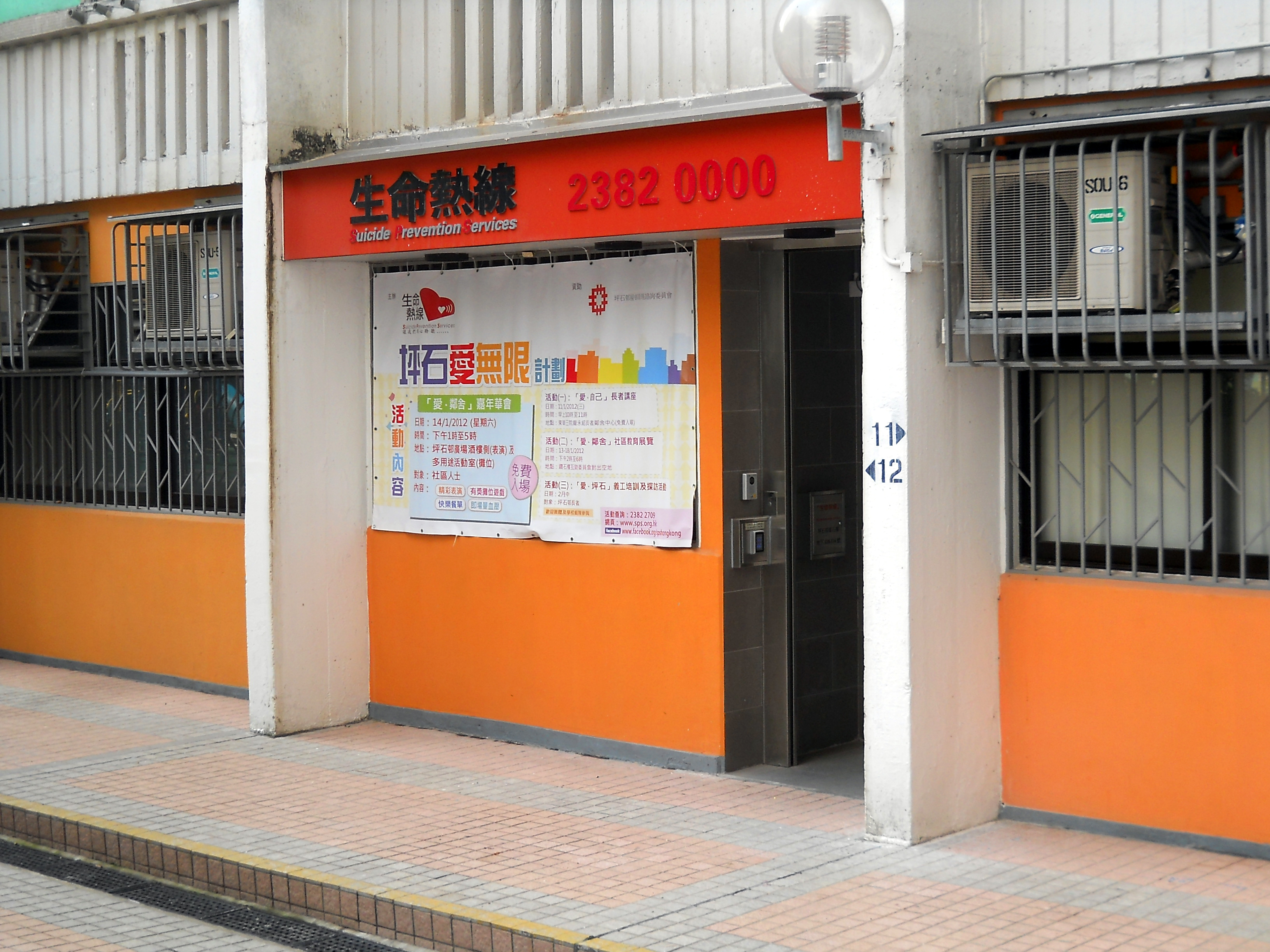 中文（香港）: 生命熱線位於坪石邨的新會址